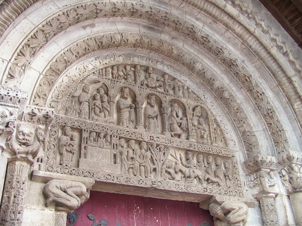 Pompierre (88), portail roman de l'église : tympan Photo prise par F5ZV en 2005 Licensing Catégorie:Image de commune des Vosges